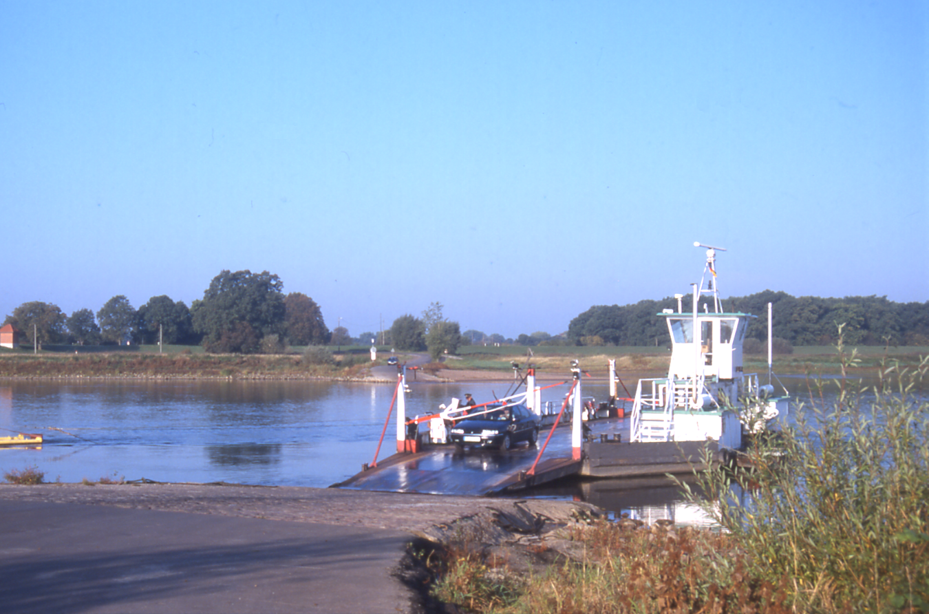 Elbfähre Sandau, links das Gierseil